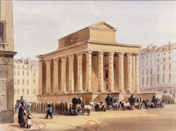 Monument expiatoire de la place Louvois (actuel square Louvois), construit à l'emplacement de l'opéra de la rue de Richelieu après l'assassinat du duc de Berry, puis détruit après 1830. Aquarelle, 8,8 x 11,9 cm, en provenance de la collection Hippolyte Destailleur.